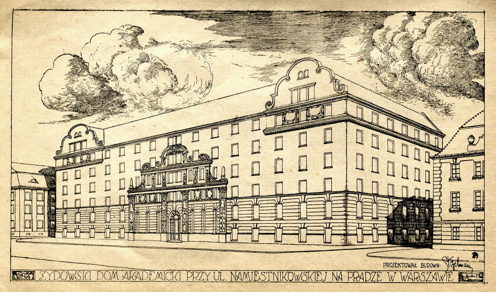 Єврейський академічний дім у Варшаві на вул. Сераковського, 7. Архітектор Генрик Штіфельман (1870—1938).